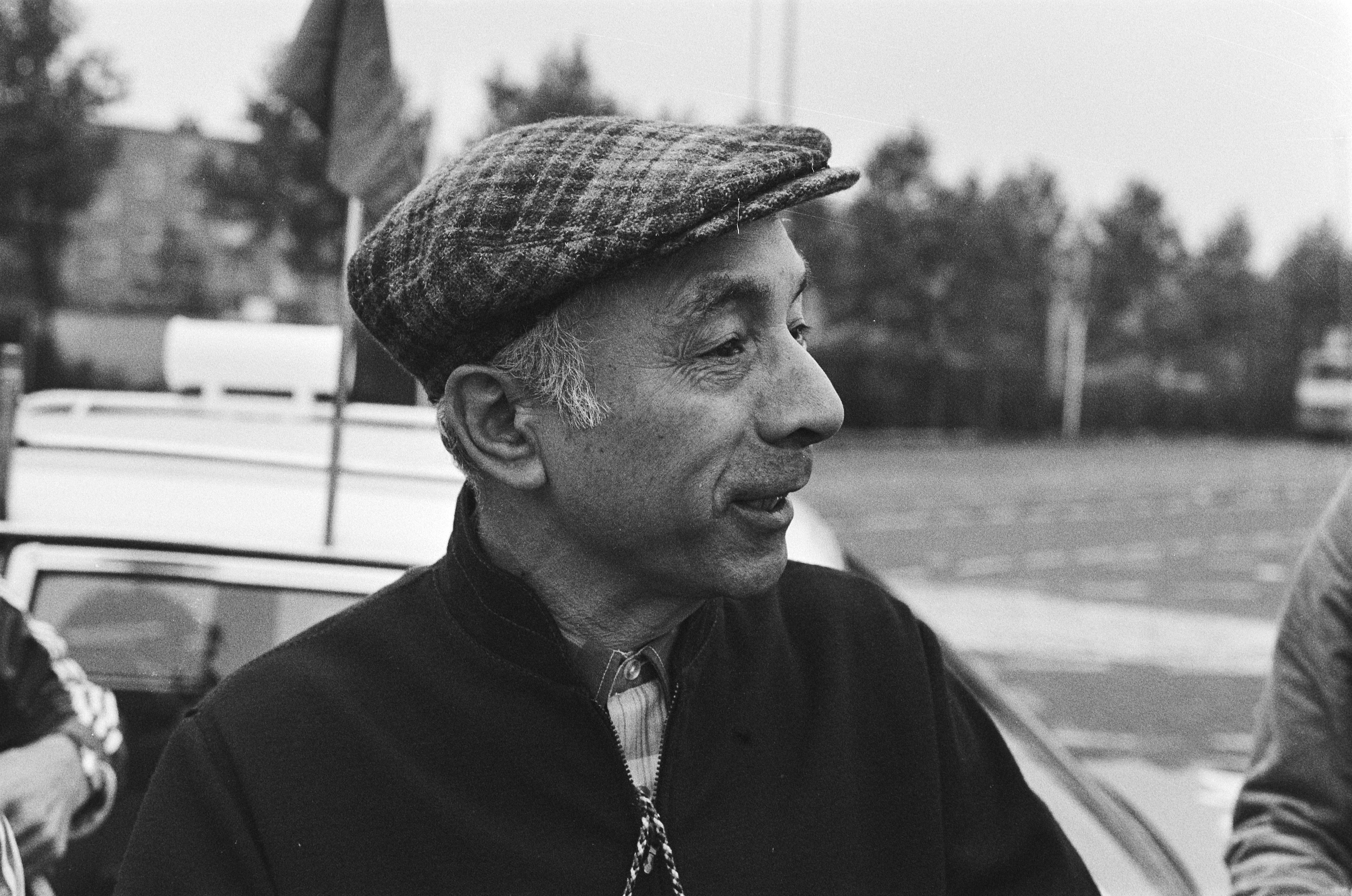 Félix Levitan lors de la 1ére étape du Tour de France 1978.